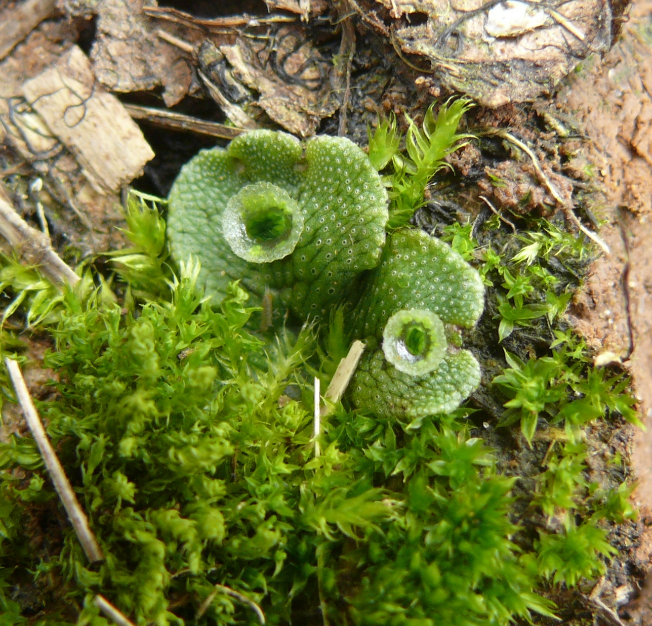 Marchantia polymorpha subsp. ruderalis, Nördlinger Ries, Deutschland